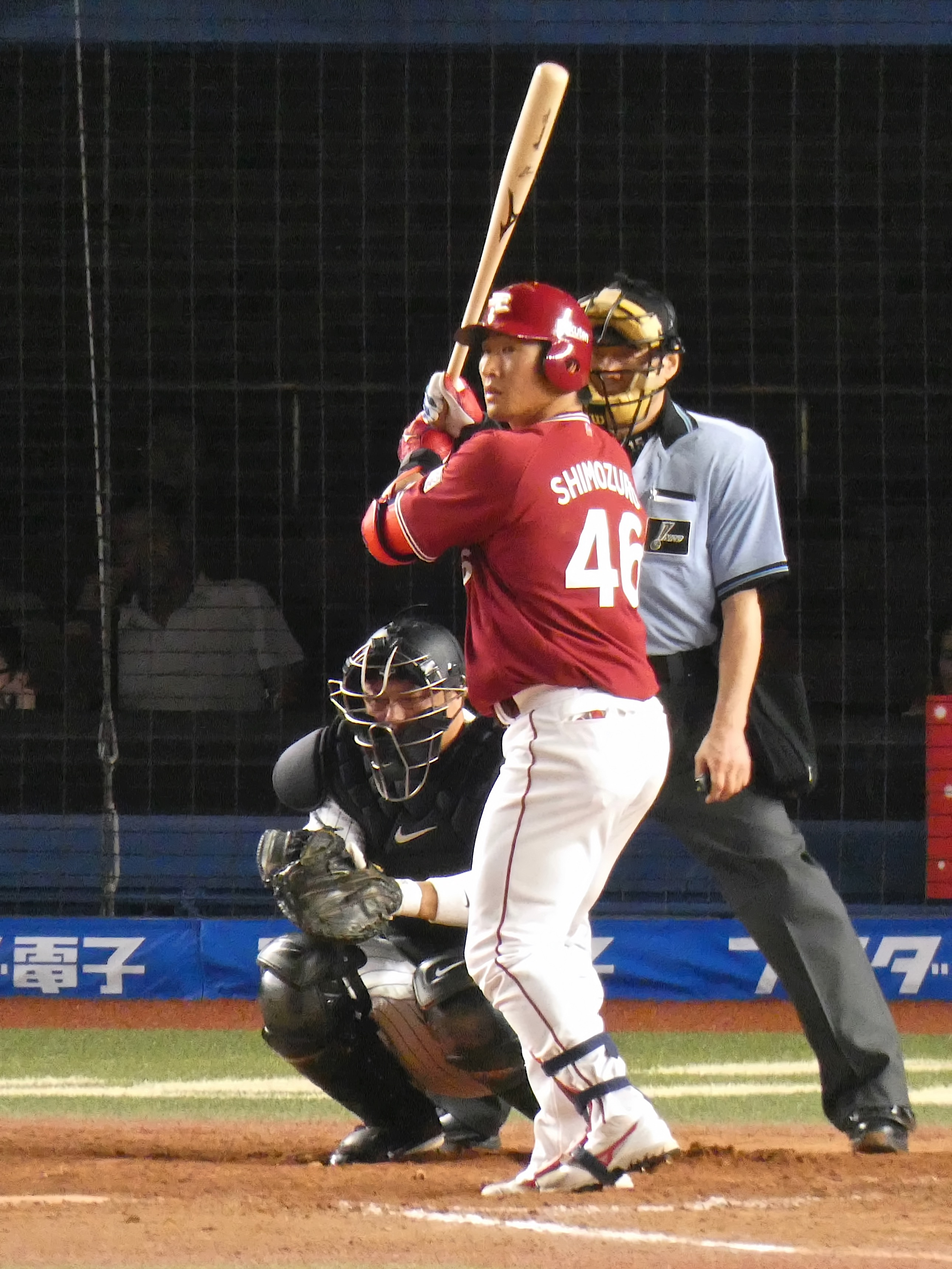 東北楽天ゴールデンイーグルスの選手「下水流昂」。ZOZOマリンスタジアムにて。